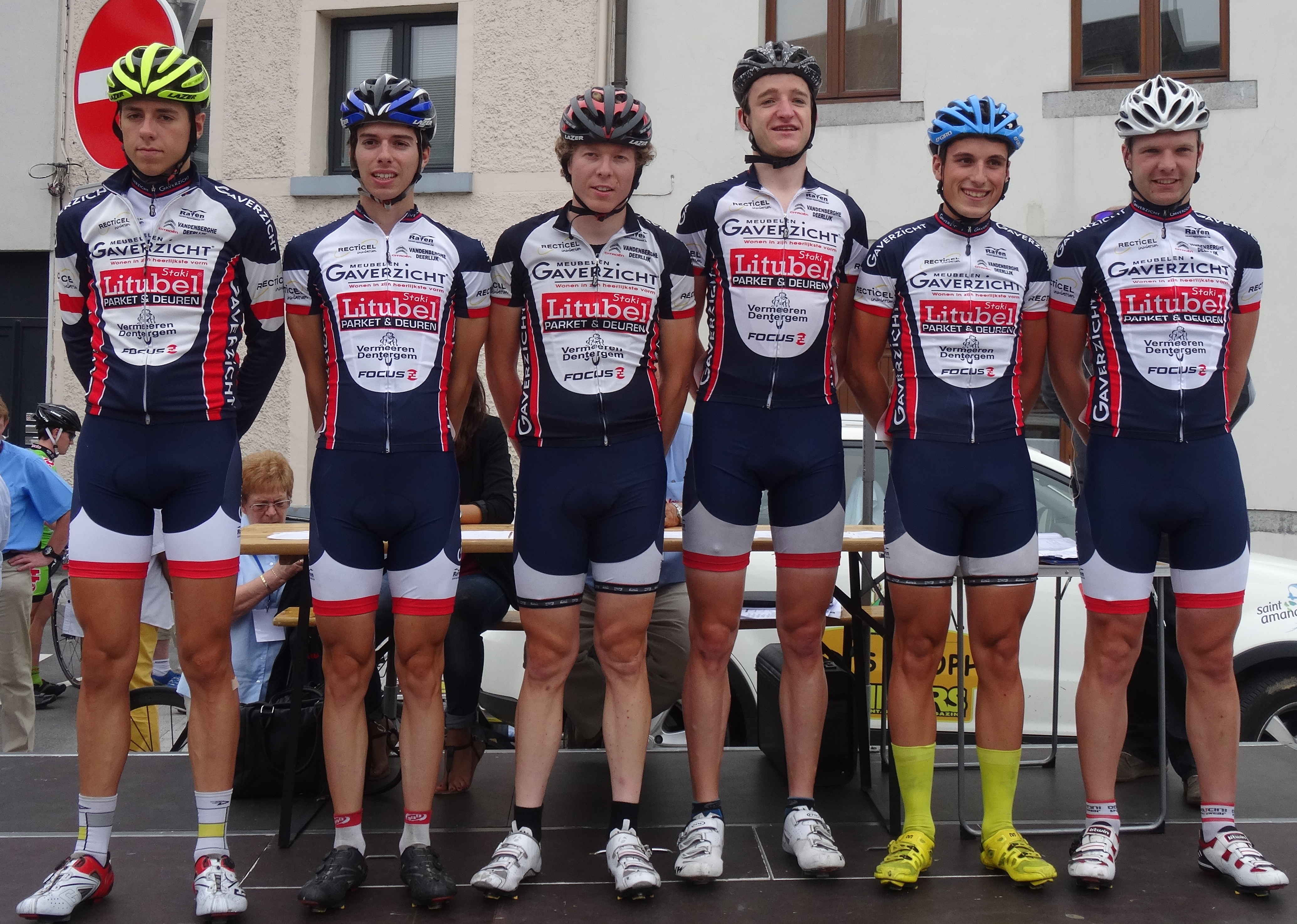 Reportage photographique réalisé le mercredi 6 août à l'occasion du départ de la première étape du Tour de la province de Namur 2014 à Jambes (Namur), Belgique.